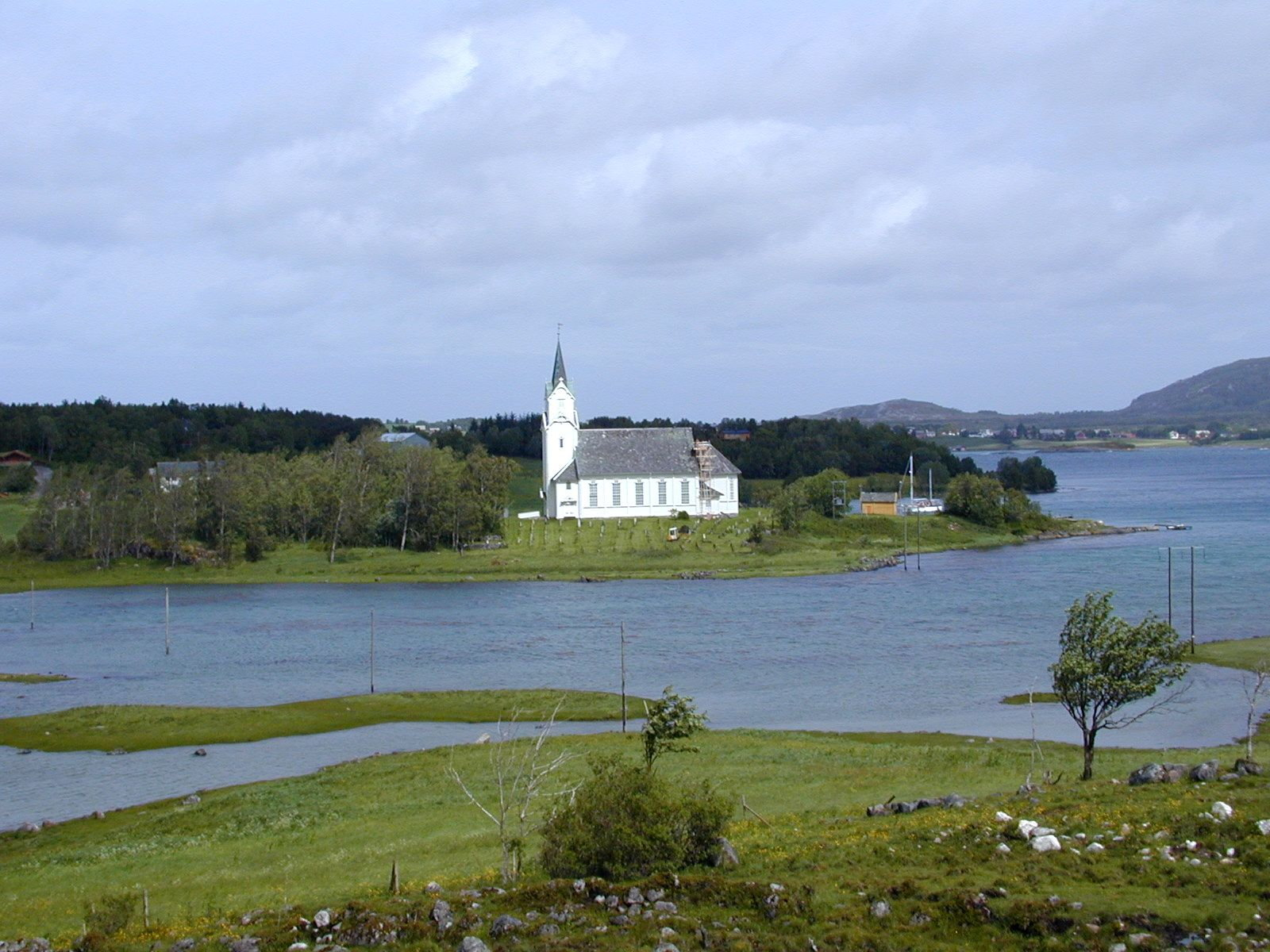 Vågøy kirke. Foto: Max Ingar Mørk. Fra Riksantikvarens Kulturminnesøk